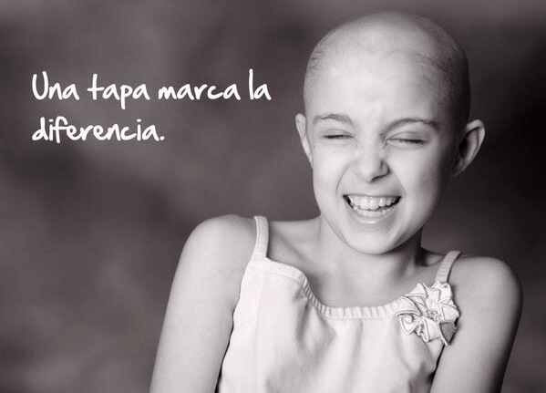 imagen reflexiva - una tapa maca la diferencia